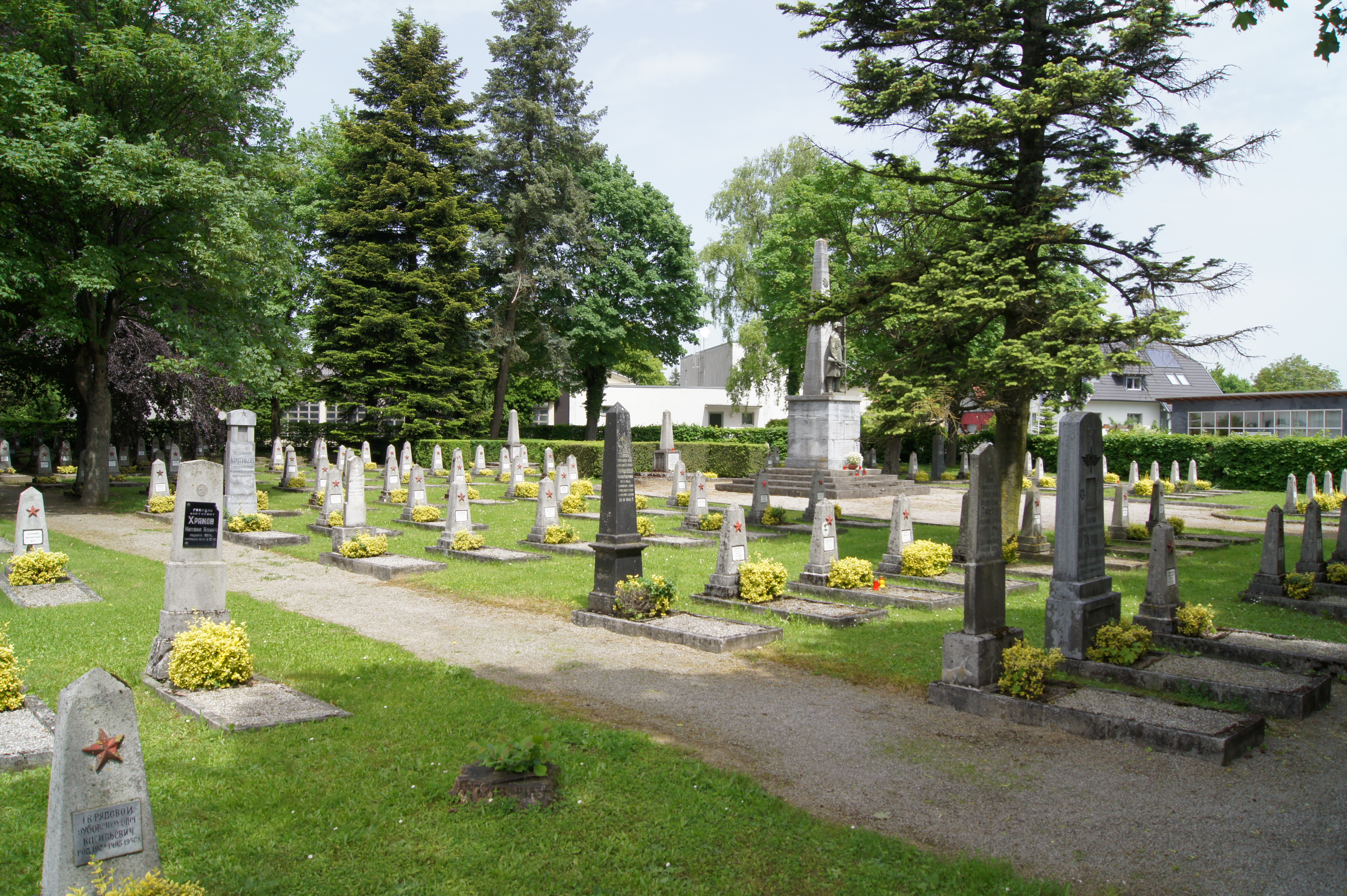 Soldaten-, Russen- oder Sowjetfriedhof am St. Pöltner Hauptfriedhof